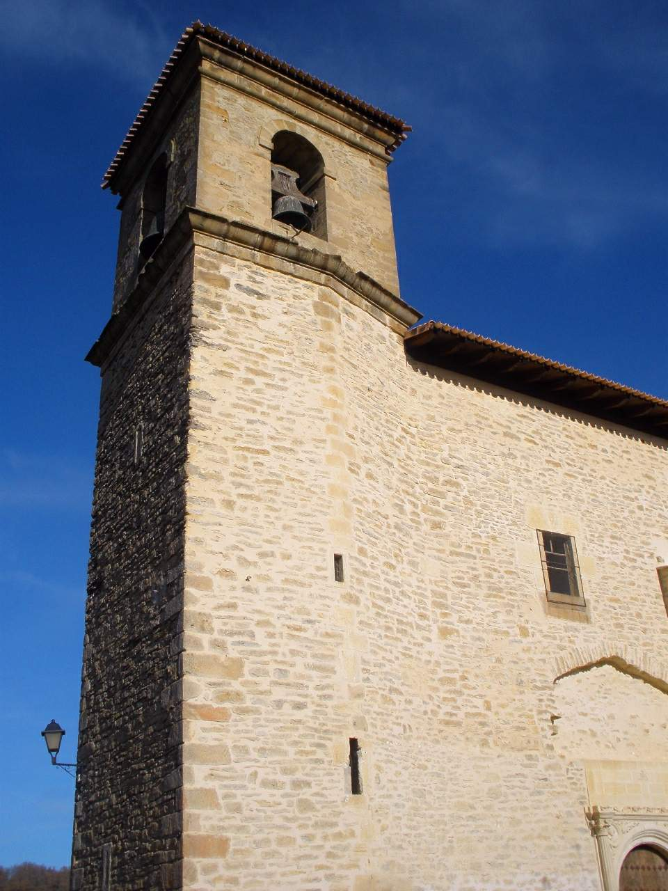 Villafranca (Álava), Iglesia de San Andrés